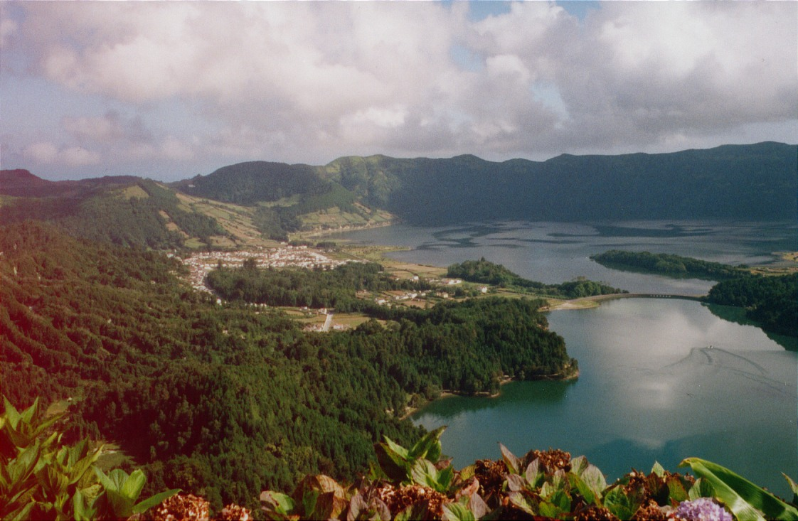 Azores - São Miguel - Sete Citades, August 1998